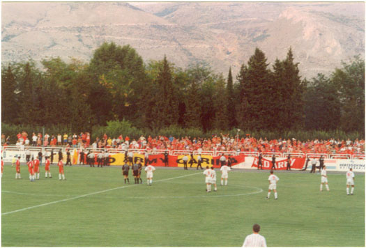 Mostar derby